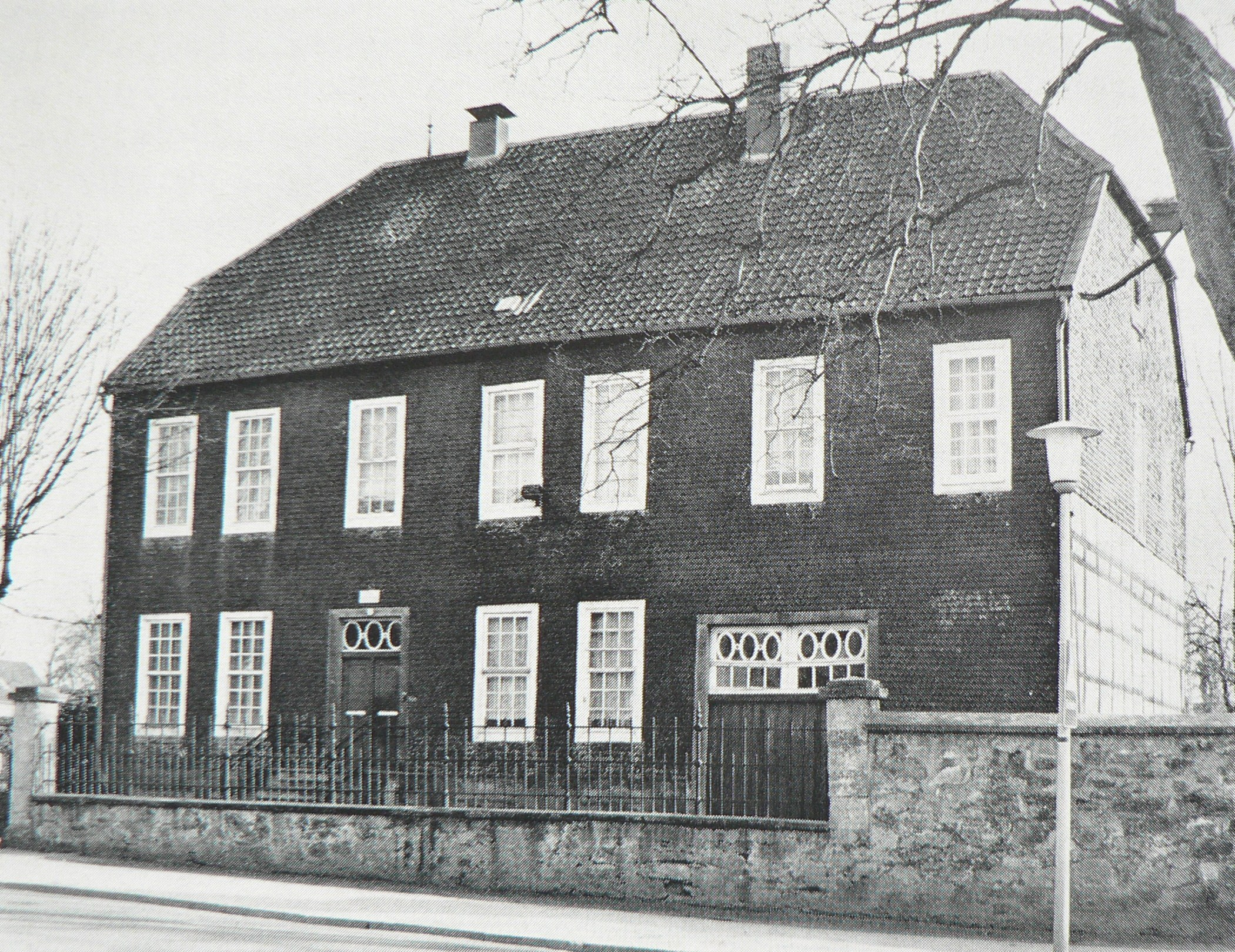 Geburtshaus von Erzbischof Albert Bitter